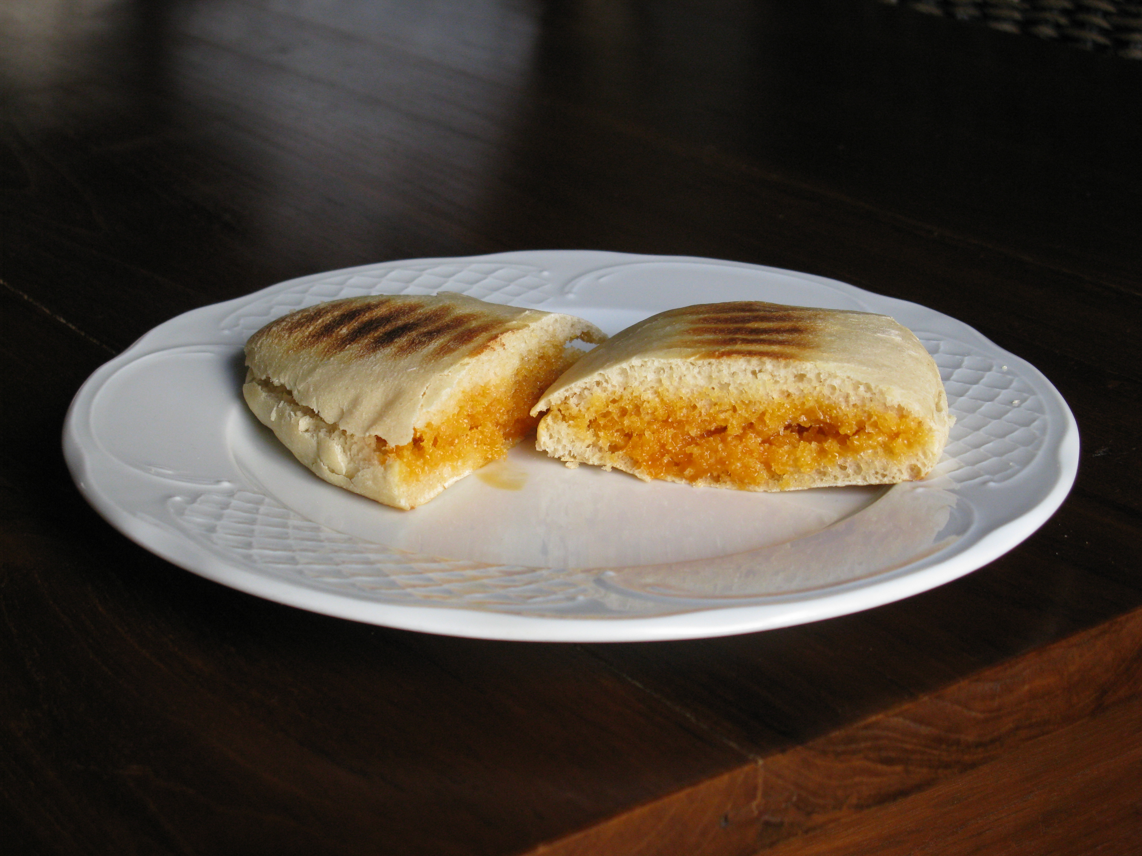 Mollete de Antequera, tostado y untado con manteca colorá de Utrera. El mollete u otro tipo de pan tostado, untado o acompañado de diferentes ingredientes, se toma de manera tradicional como desayuno en Andalucía. Foto tomada en Utrera, provincia de Sevilla, España.